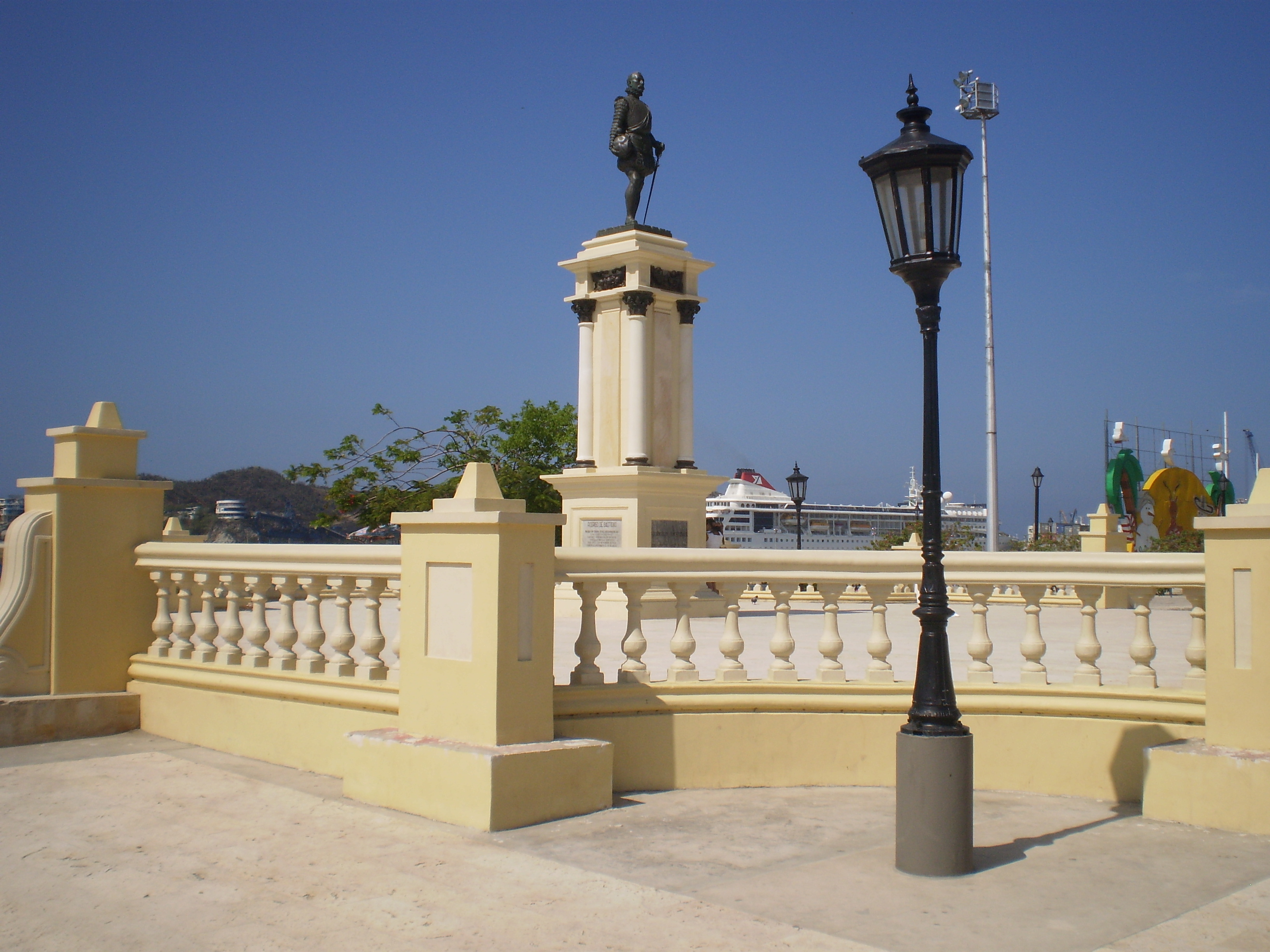 Sector Antiguo de la ciudad de Santa Marta